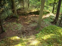 Burgstall Waldburg (Oberösterreich)